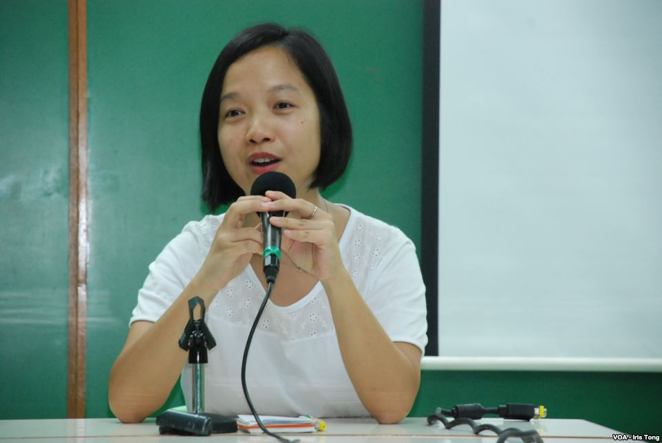 國民教育家長關注組成員張韻琪表示，社會上應該尊重年青人對社會及政治的思考空間